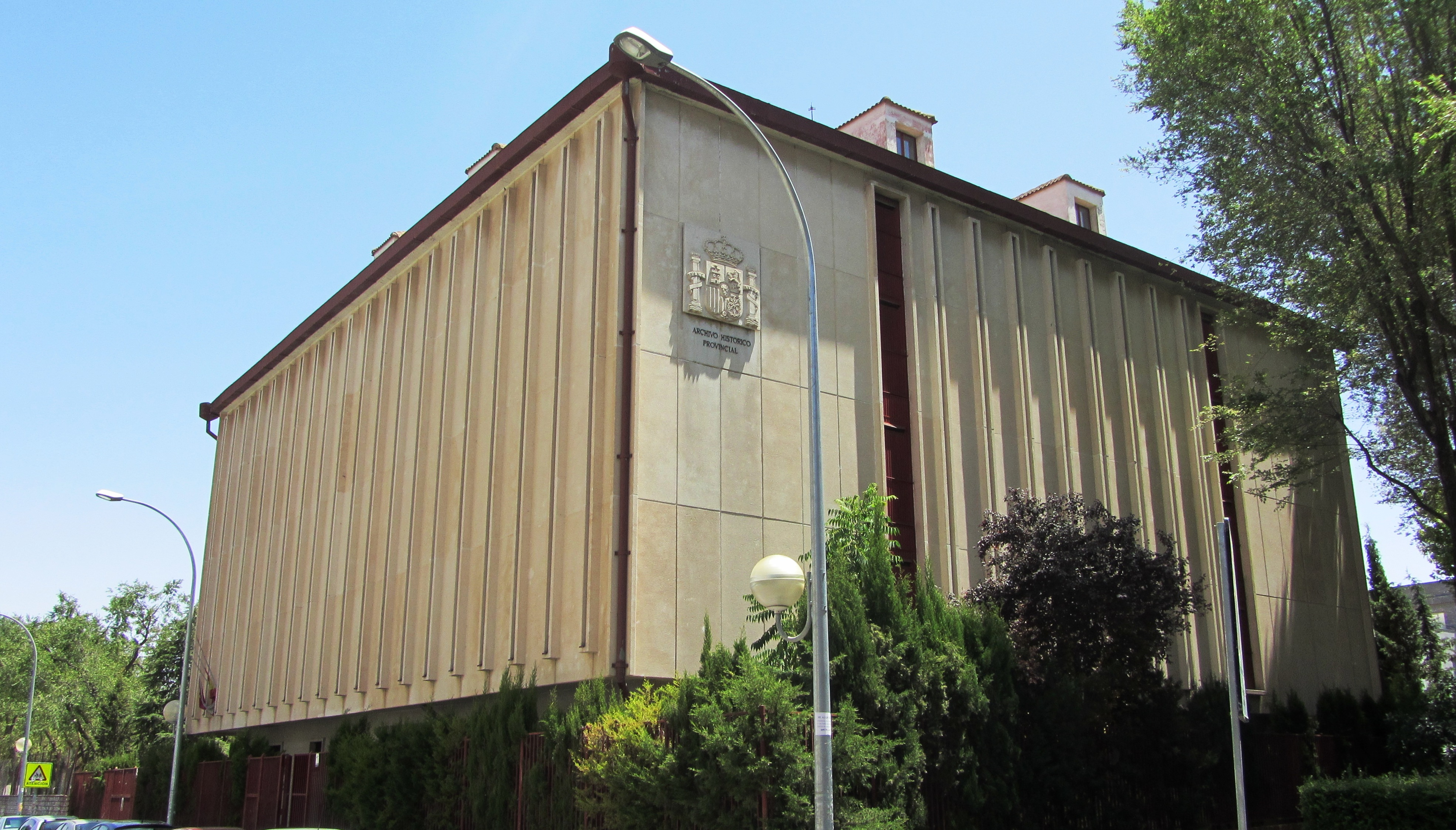 El Archivo Histórico Provincial de Ciudad Real (1934) dispone de documentos procedentes de organismos públicos y privados de ámbito provincial.